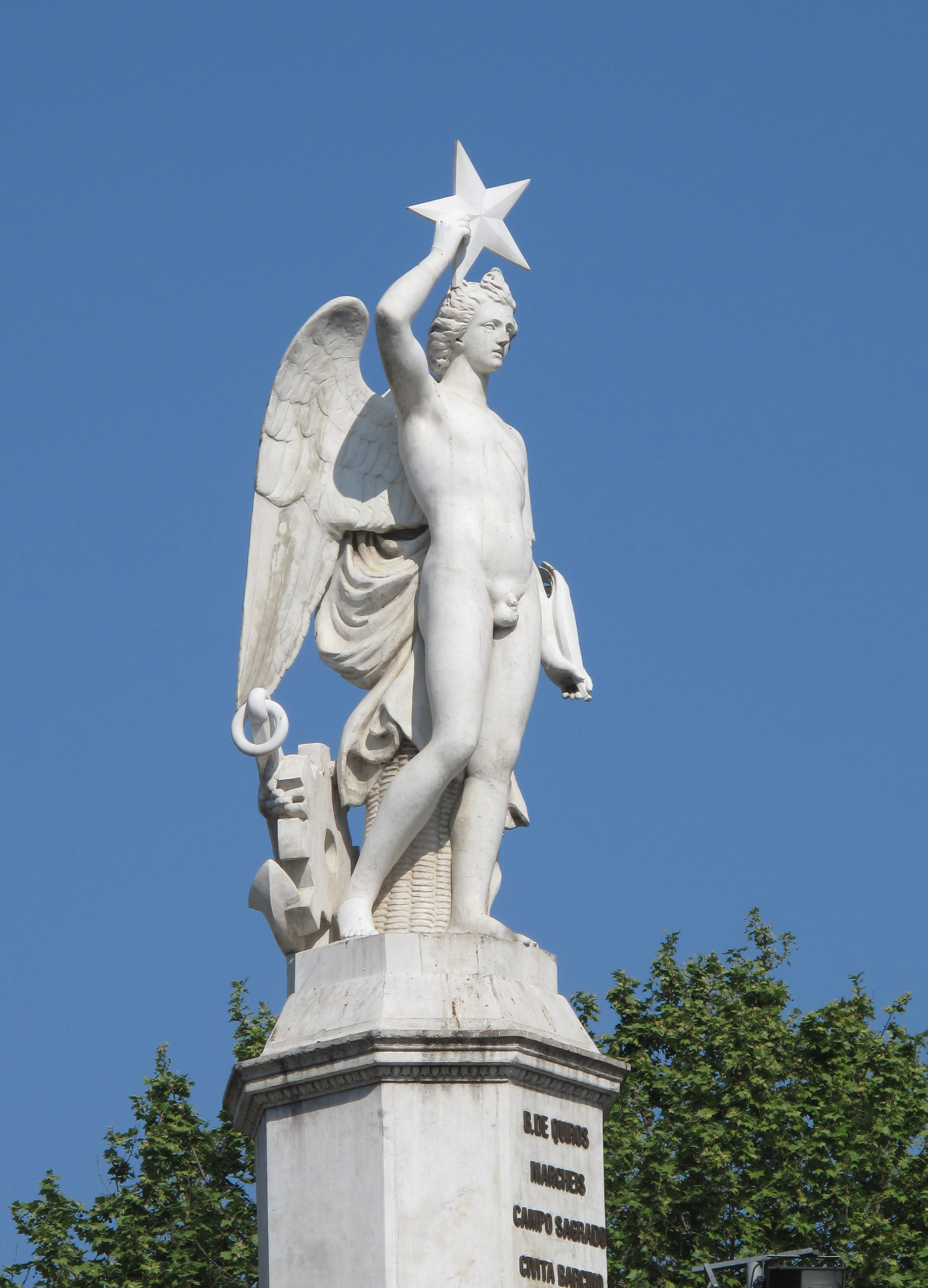 Font del Geni Català, de Francesc Daniel Molina (1856), al pla de Palau, Barcelona; detall de l'escultura